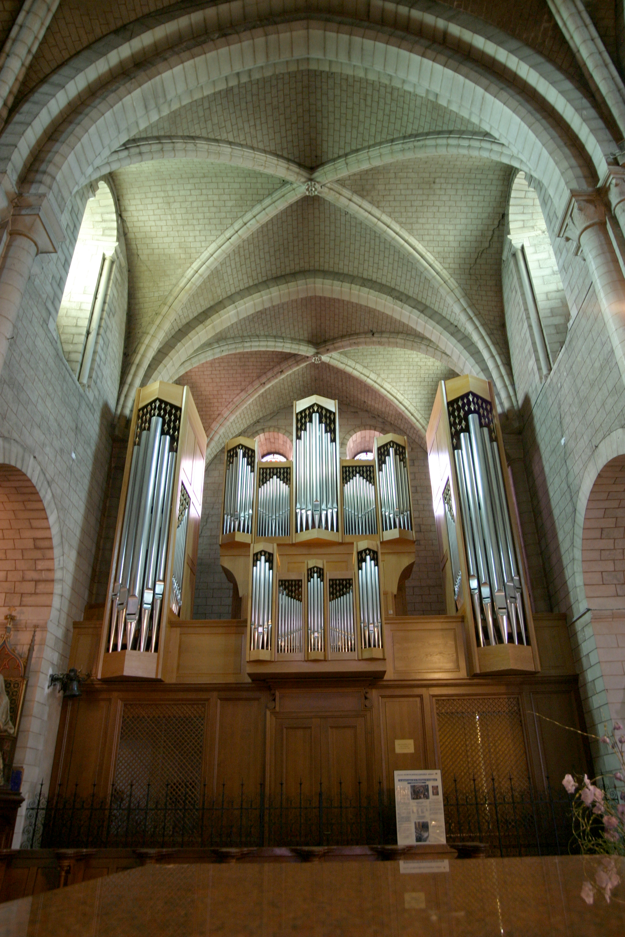 Grand Orgue de la basilique Notre-Dame de Bonne-Garde de Longpont-sur-Orge